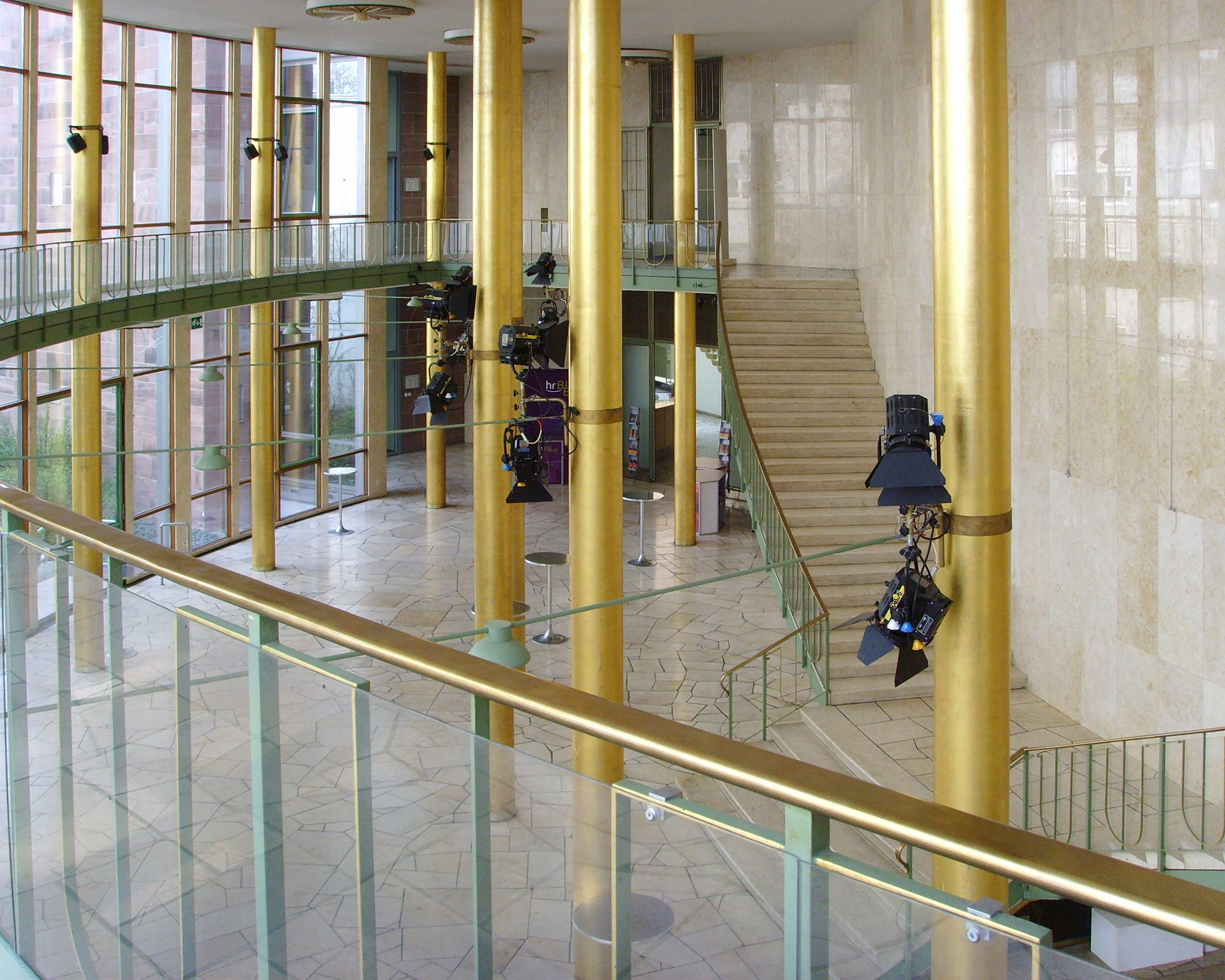 "Goldhalle" des Hessischen Rundfunks (hr) in Frankfurt am Main Herkunft: eigene Aufnahme geplant als Lobby des Deutschen Bundestags, dient sie heute als Vorhalle des hr-Sendesaals, für Empfänge und Ausstellungen entstanden: 16.03.2007